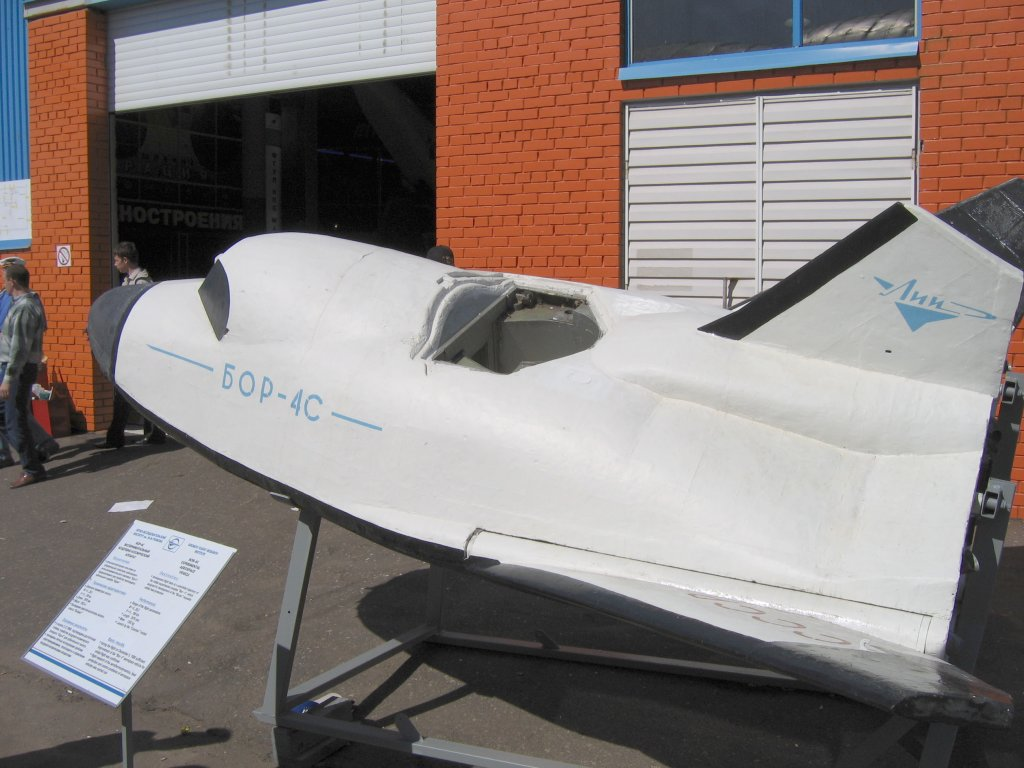 BOR-4S at MAKS, Zhukovskiy, 2005.